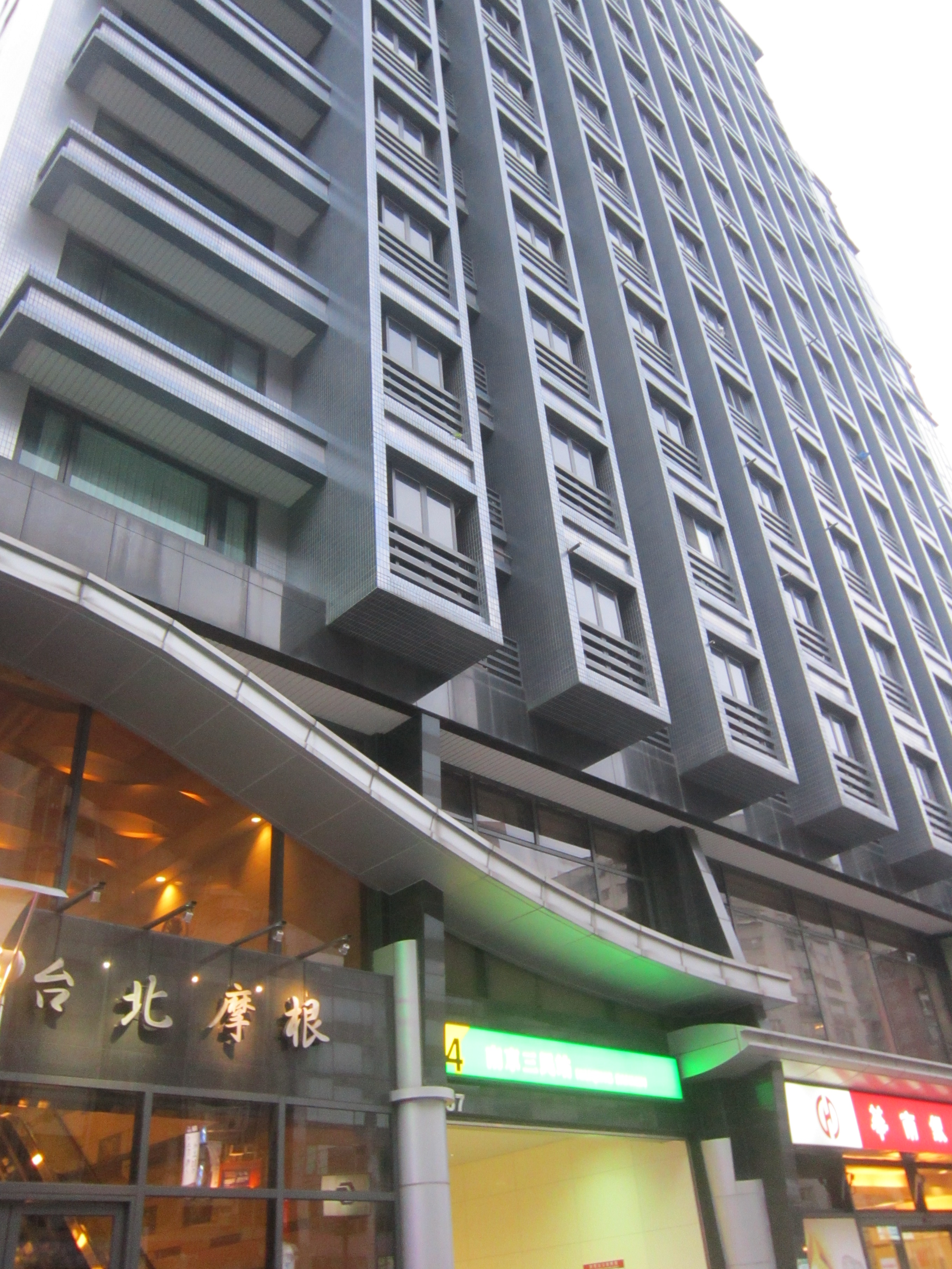 興富發建設位於台北捷運南京三民站4號出口的聯開共構案(臺北摩根)